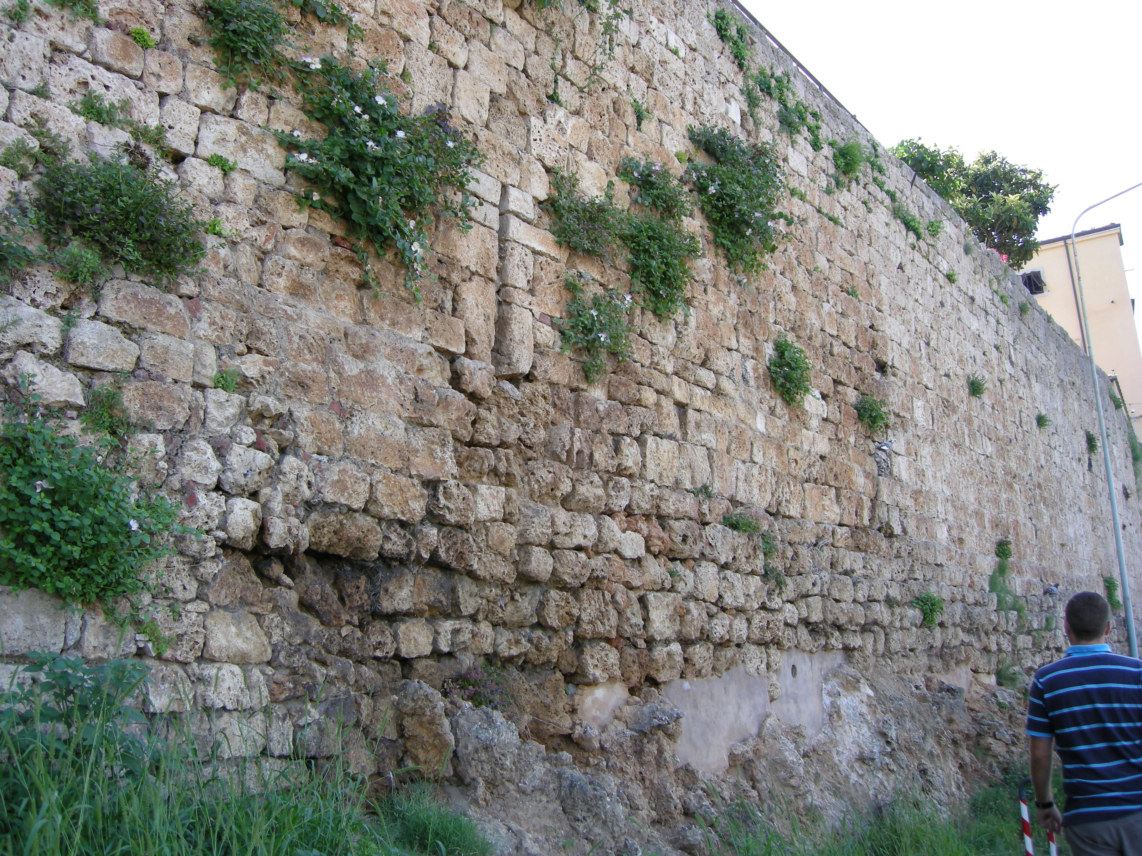 Mura di massa marittima